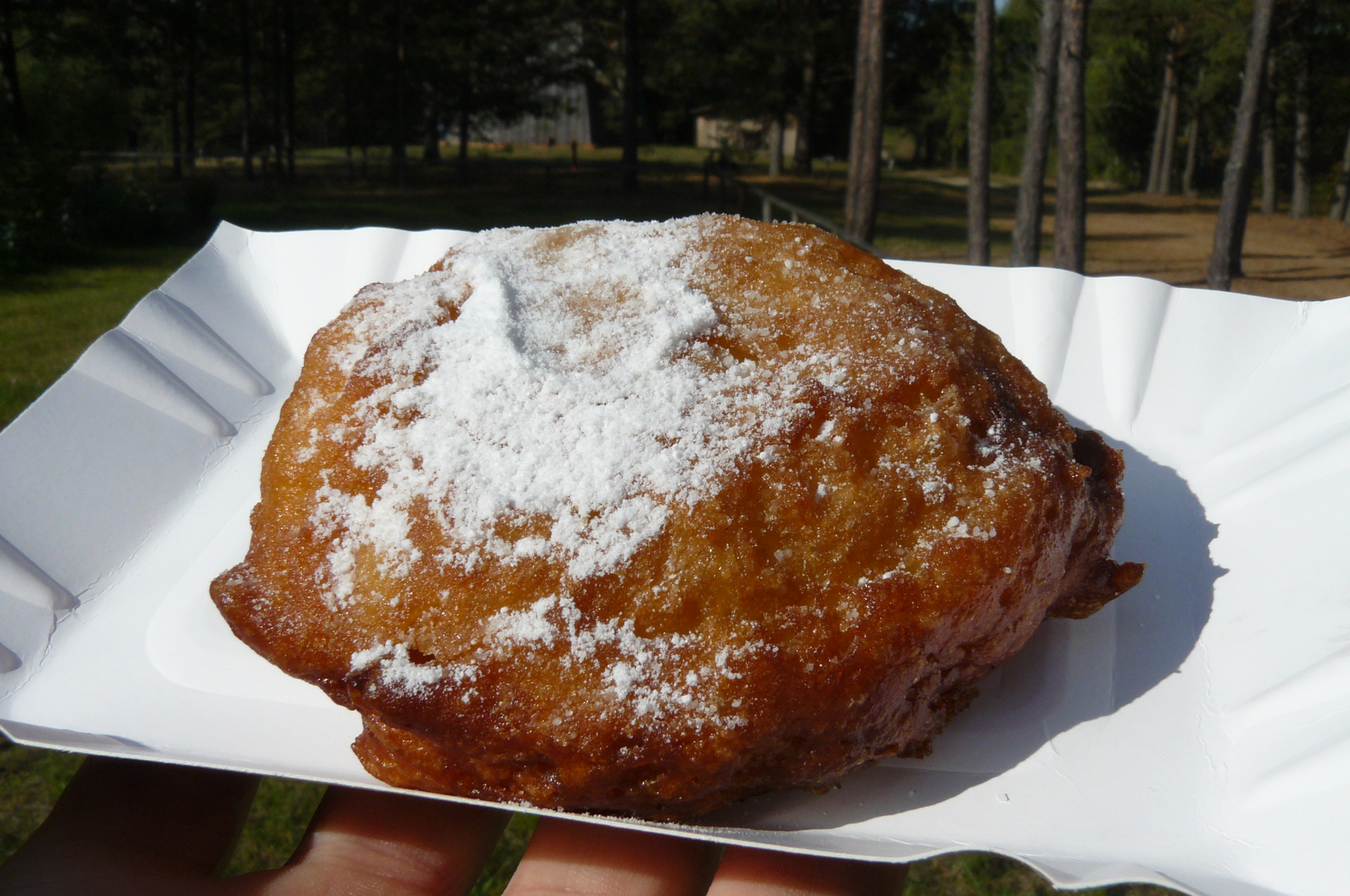 Ruchanka (racuch) ze skansenu we Wdzydzach Kisz.